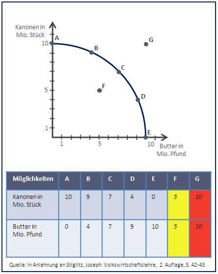 Anwendungsbeispiel Transformationskurve